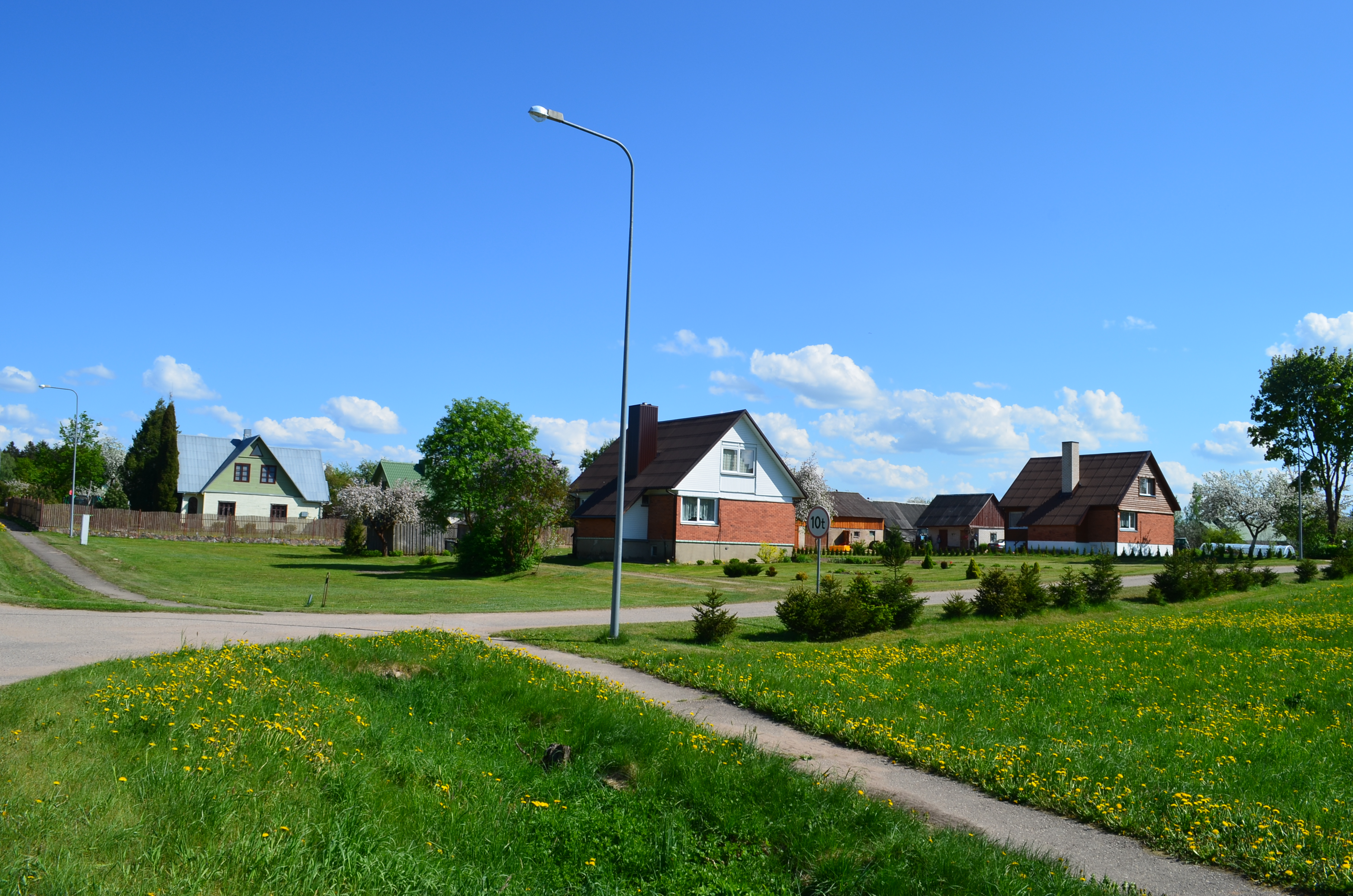 Girsteitiškis, Balninkų sen., Molėtų raj.